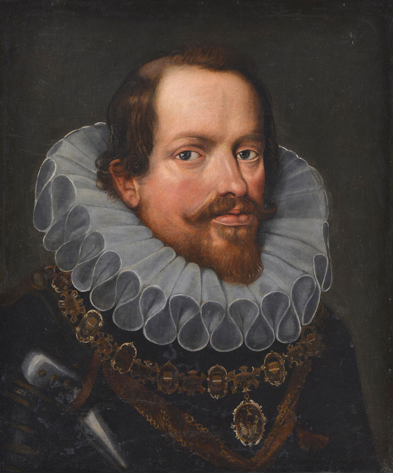 Vincenzo I Gonzaga Anziano